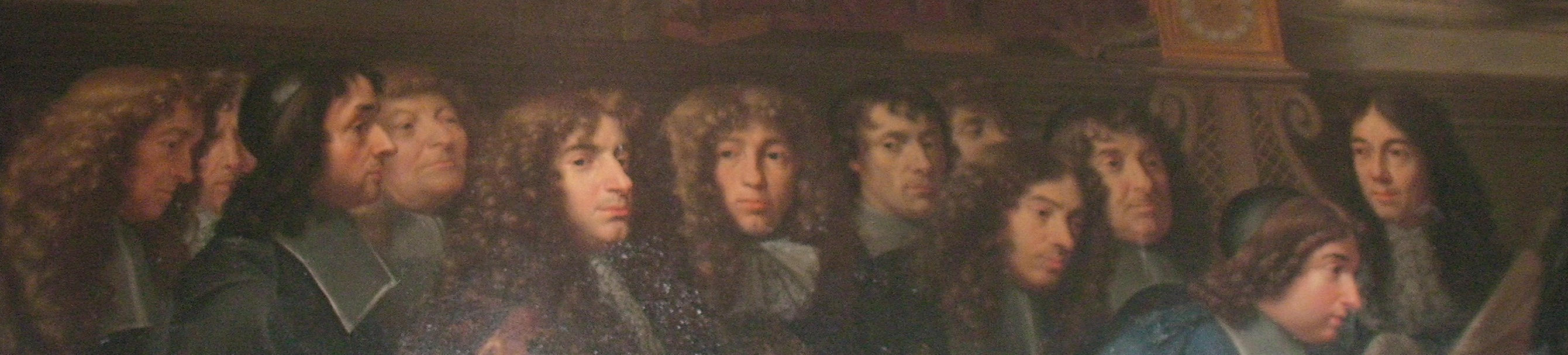 Detail van "Etabilissement de l'Academie des Sciences et fondation de l'observatoire. 1666." van Henri Testelin. (Paleis te Versailles).